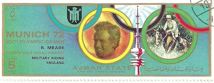 Richard Meade